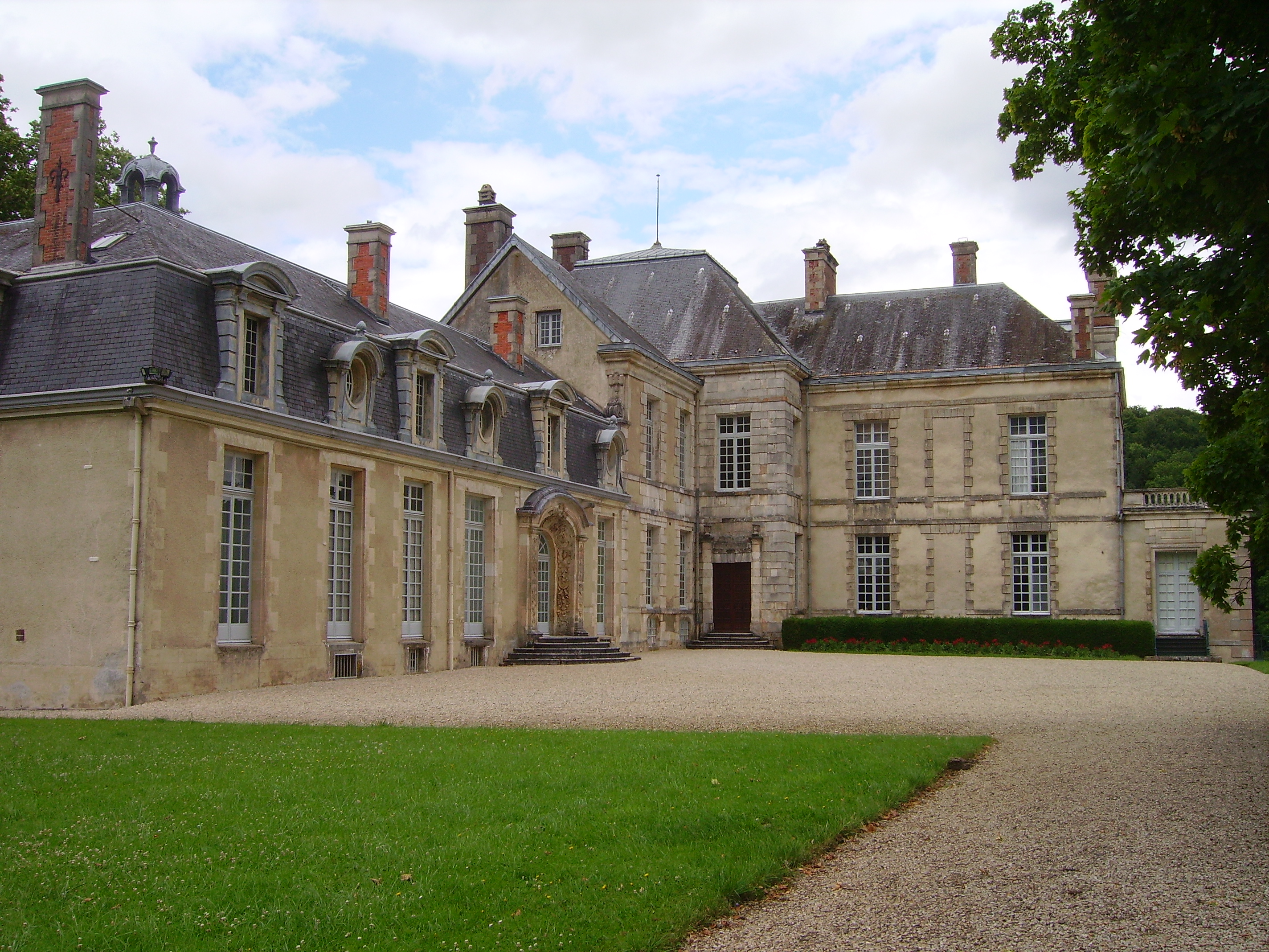 vue de l'arrière du château This building is en partie classé, en partie inscrit au titre des Monuments Historiques. .